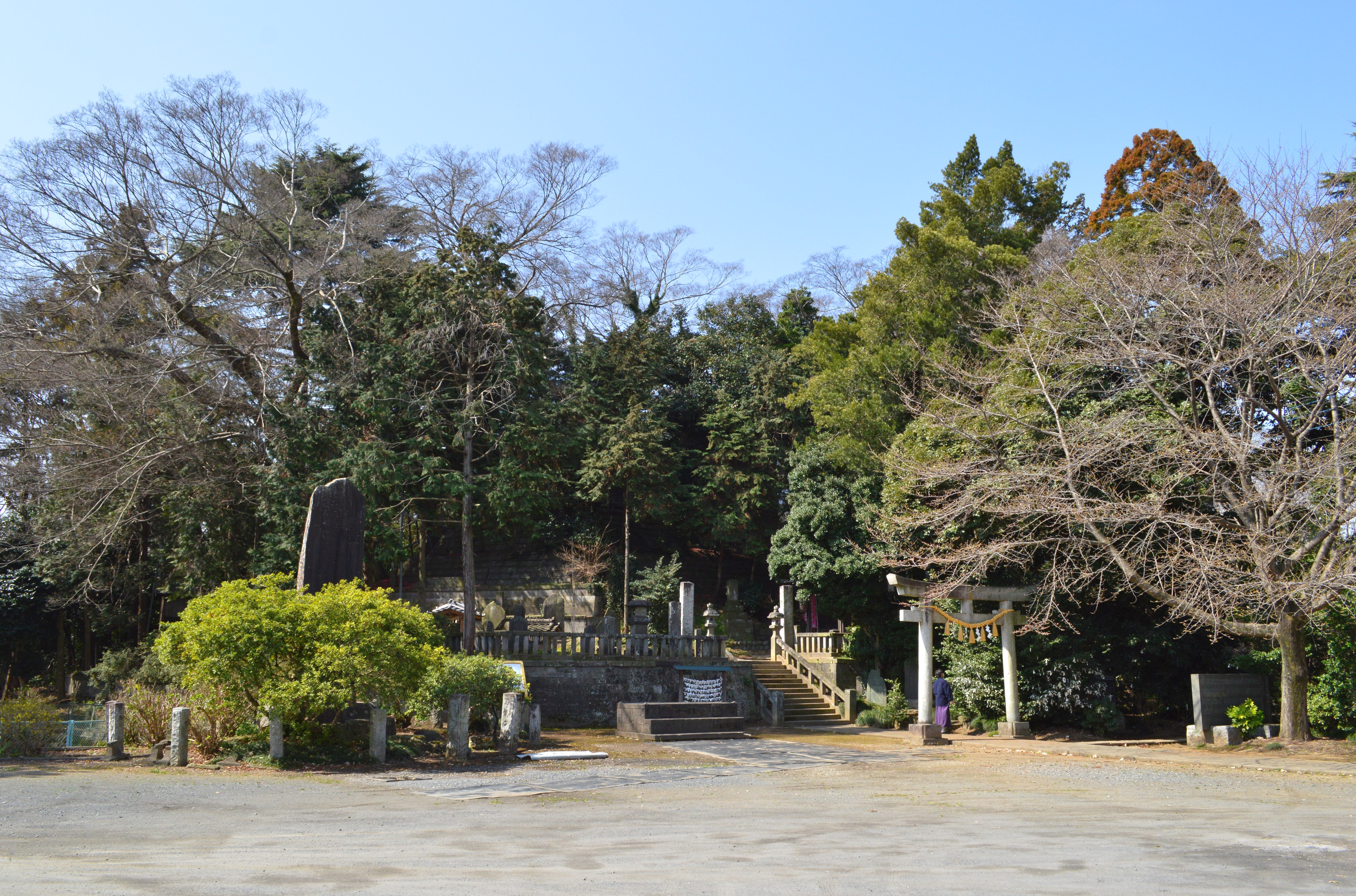 浅間塚古墳 (行田市) 墳丘全景